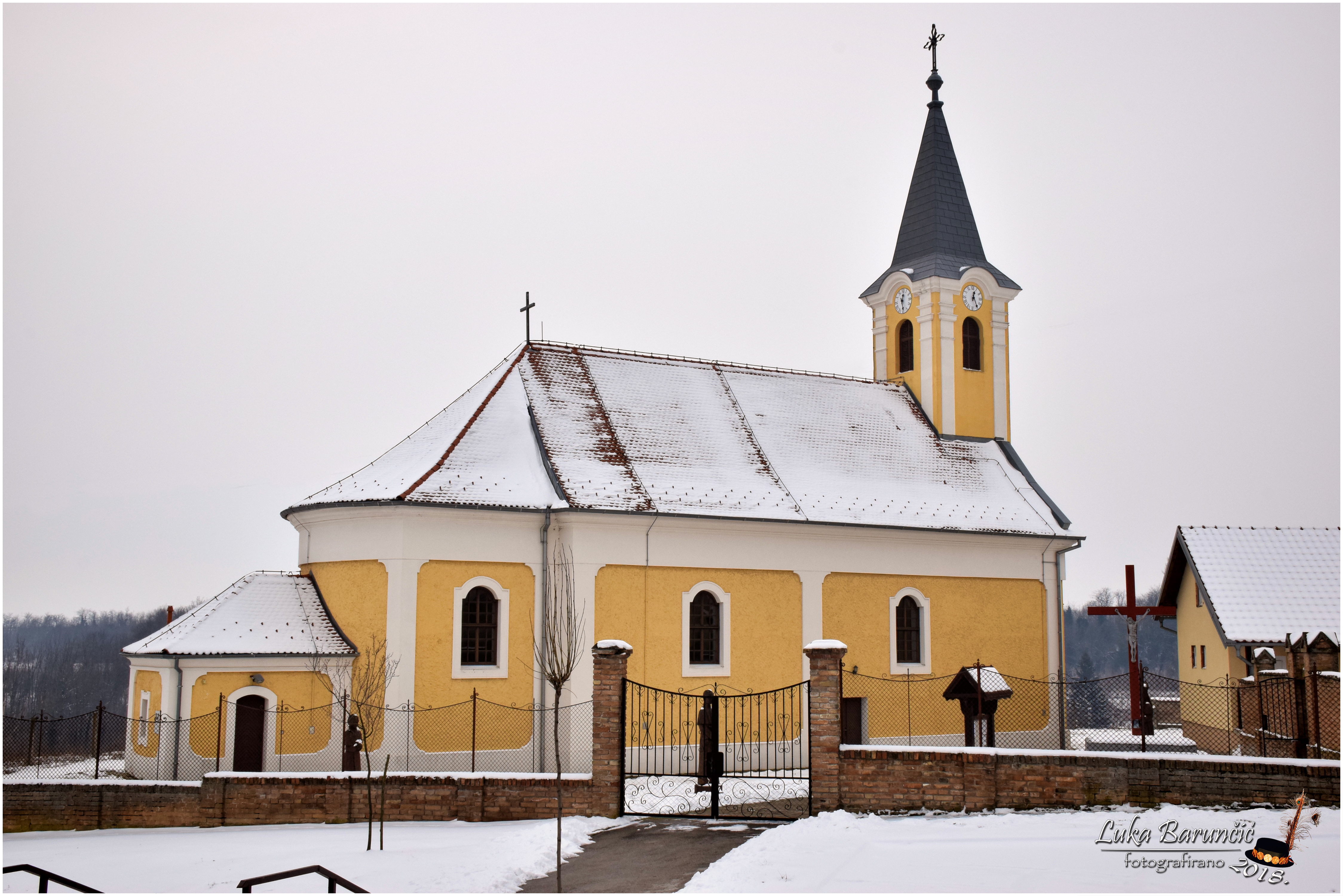 Crkva sv. Mihaela Arkanđela